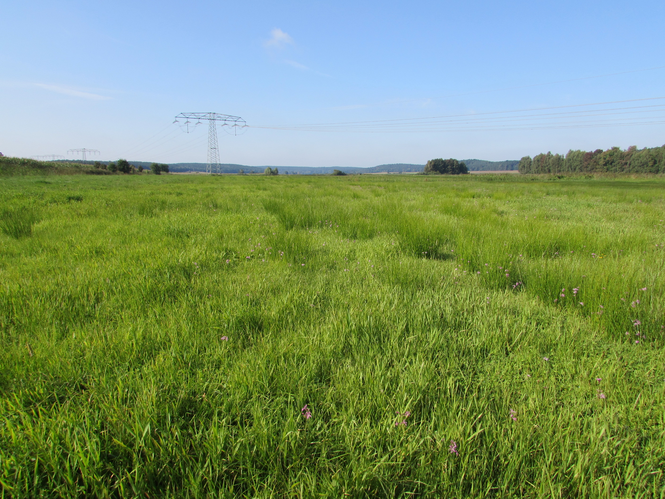 marzahner fenn nördlich von butzow, blick nach südwesten